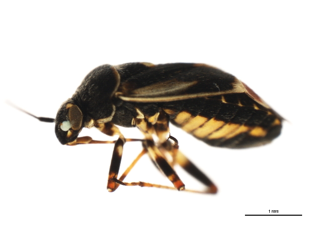 ჭარხლის ბაღლინჯო (Polymerus cognatus)